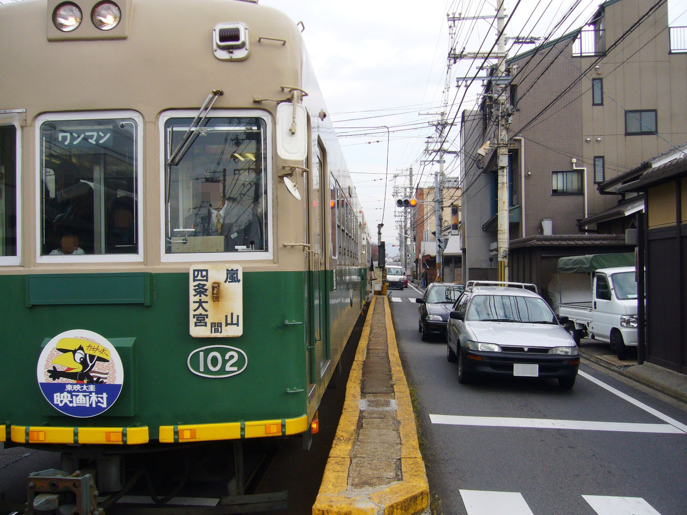 京都市右京区にある京福電気鉄道（嵐電） 山ノ内駅の安全地帯。モボ101形の102号車の嵐山行きが停車中。極めて幅の狭い安全地帯であり危険なため、電車の入駅とともに駅前後の信号機が赤に変わる。2008年11月23日に投稿者が撮影。なお、人物の顔やナンバープレートには処理を加えている。